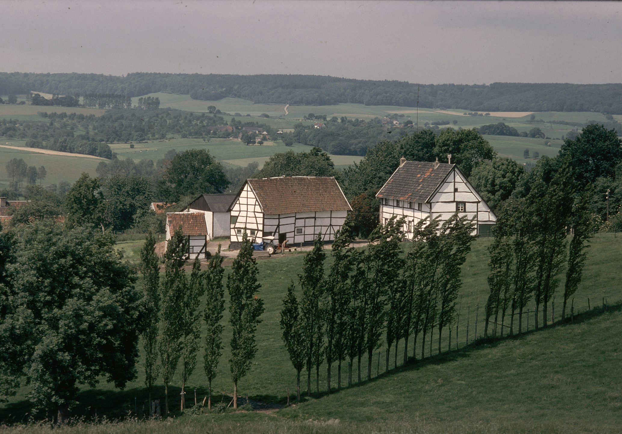 Dorpsgezicht: Exterieur OVERZICHT DORP